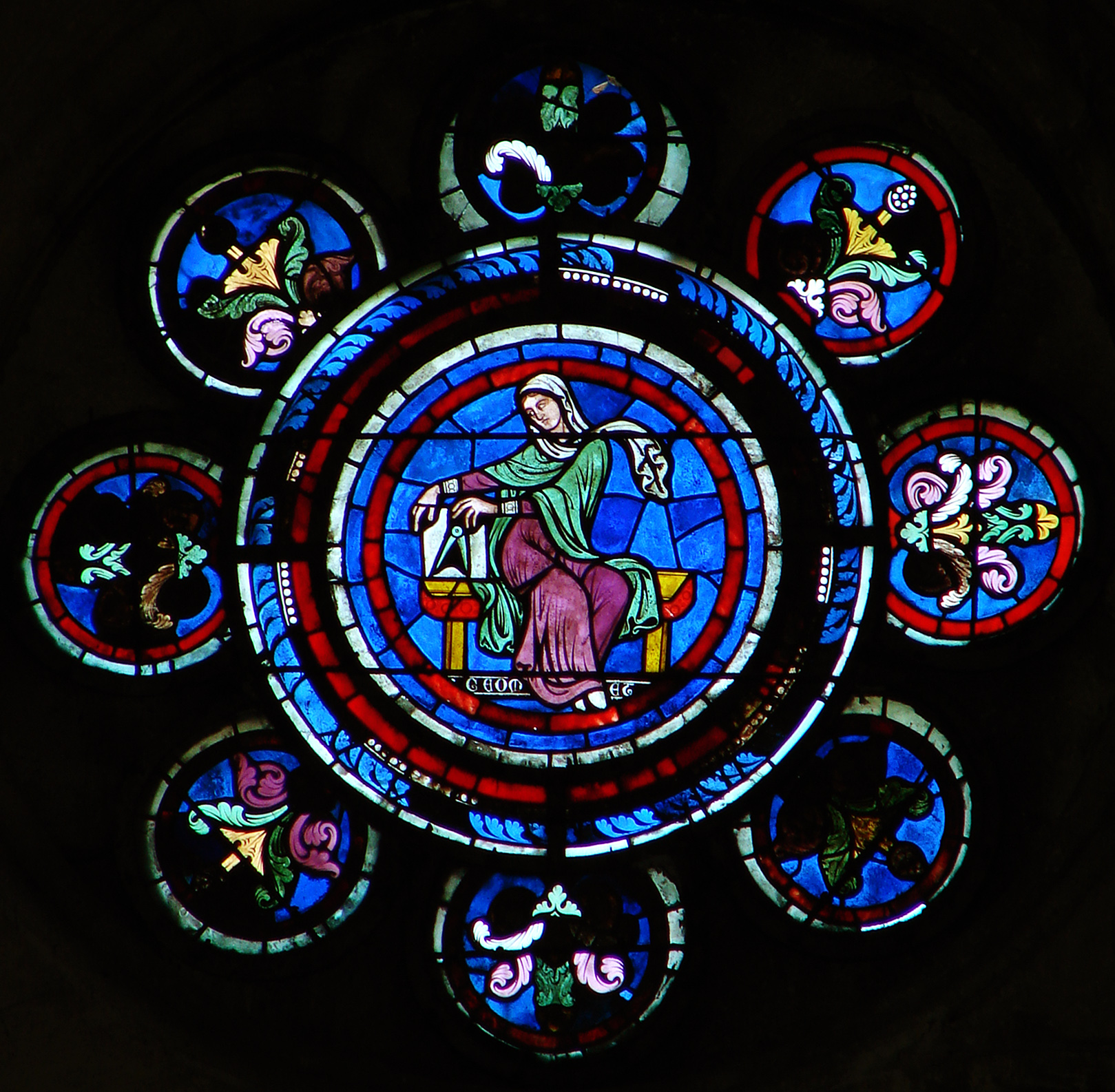 La Géométrie (1200-1210), médaillon de la rose du transept Nord de la cathédrale Notre-Dame de Laon: la Rose des Arts libéraux. (Les médaillons représentent les 7 arts libéraux, auxquels ont été ajoutées la Médecine et la Philosophie (médaillon central). Le vitrail date de 1200 à 1210, mais quatre médaillons ont été réalisés par Adolphe Charles Edouard Steinheil en 1865 (la Philosophie, la Rhétorique, la Musique, la Médecine); il a repris les figures des voussures d'un portail de la façade, consacrées elles aussi aux Arts libéraux). (Source: le site du Ministère de la Culture)